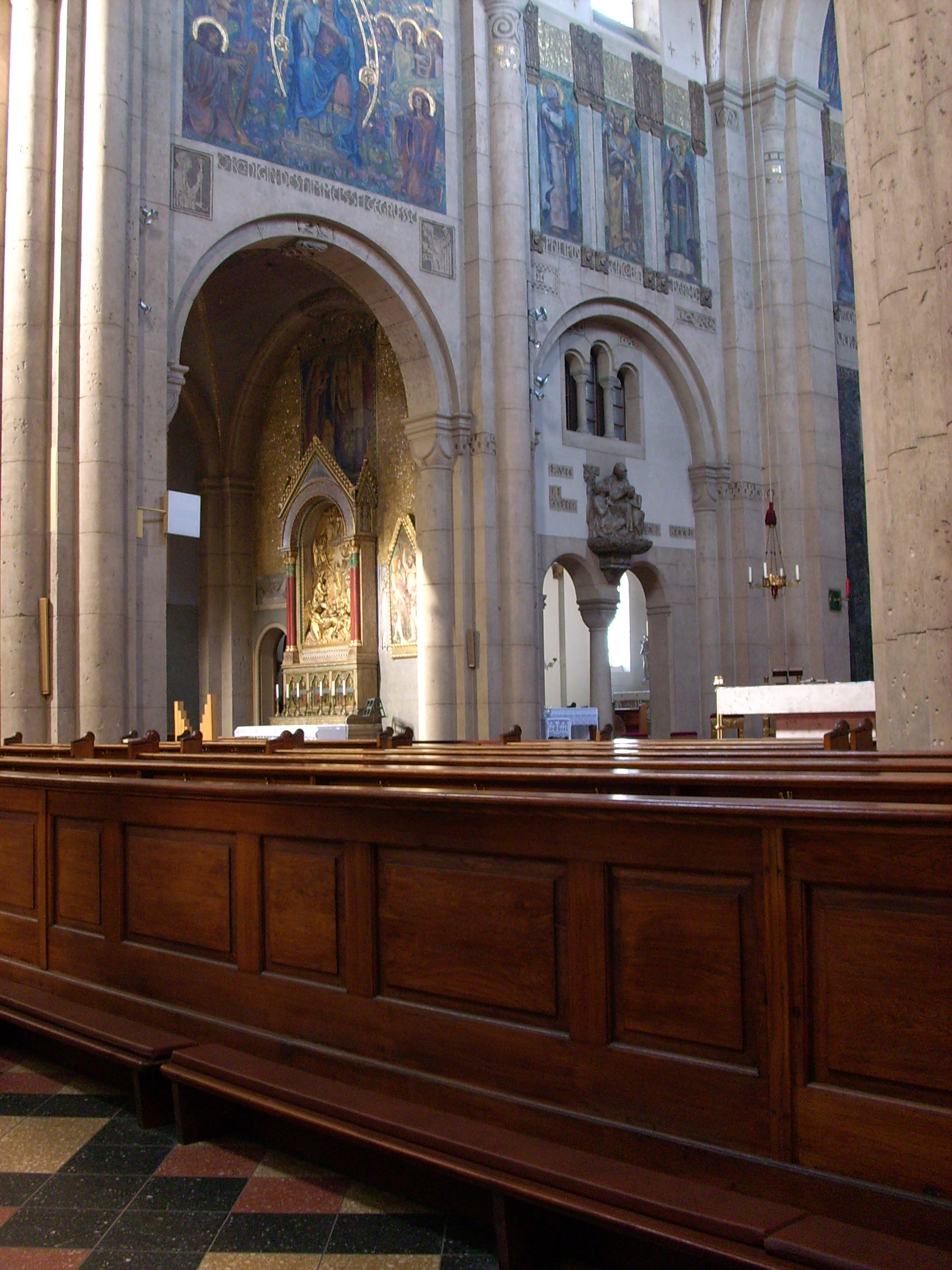 Blick zum Seitenaltar auf der linken Seite und zur kleinen Sakramentskapelle, St. Josef (Weiden in der Oberpfalz)